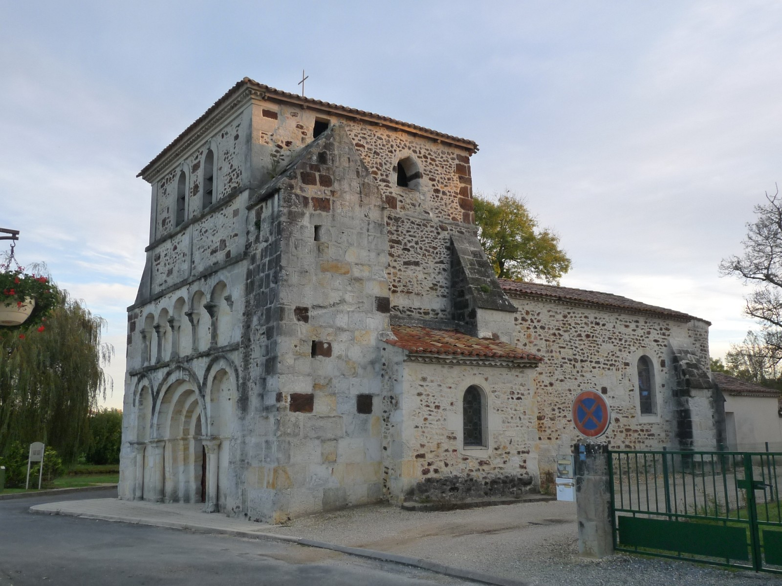 Eglise de Bussac-Forêt, Charente-Maritime, France